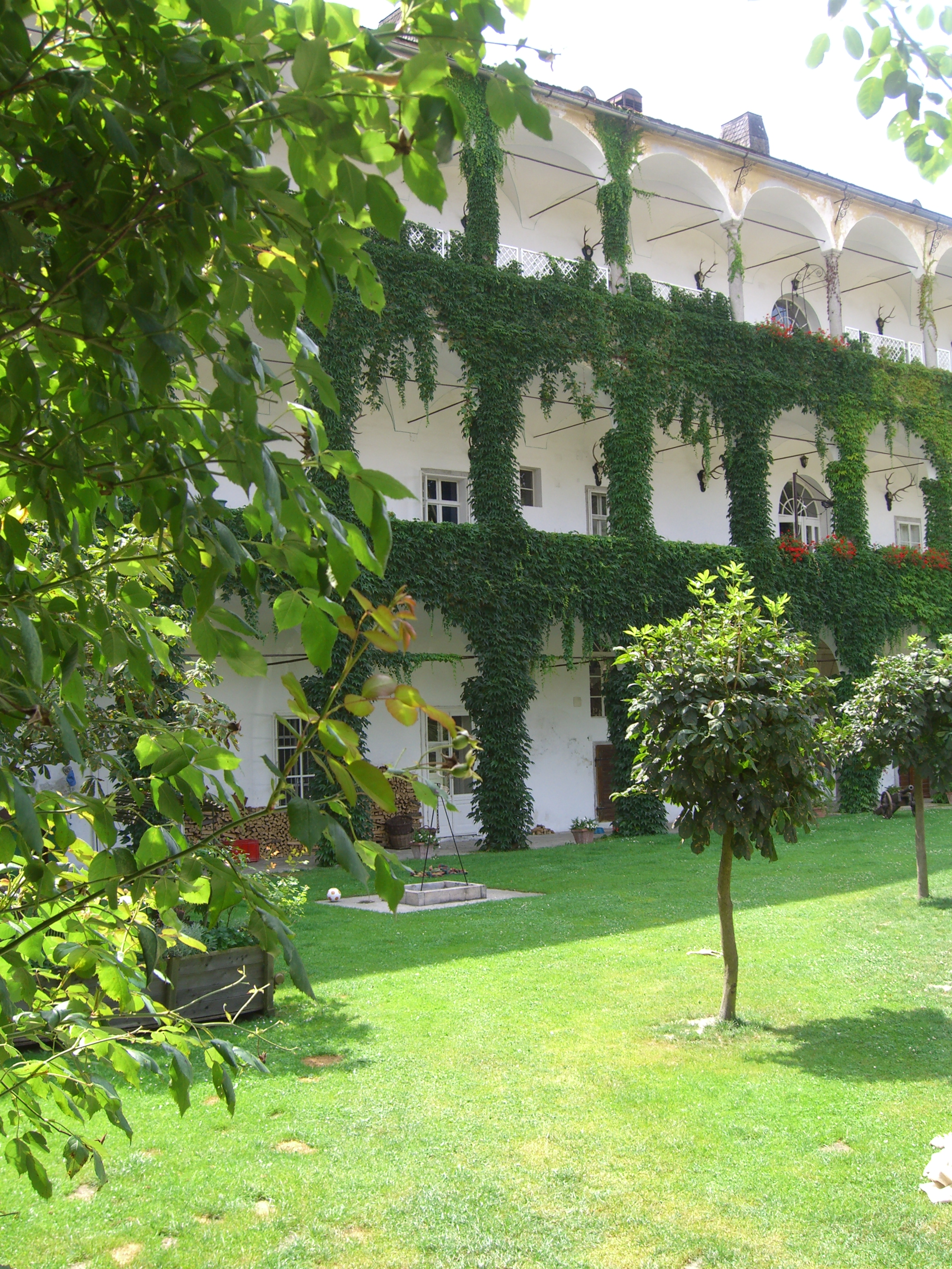 Schlosshof mit 3 stöckigen Arkarden